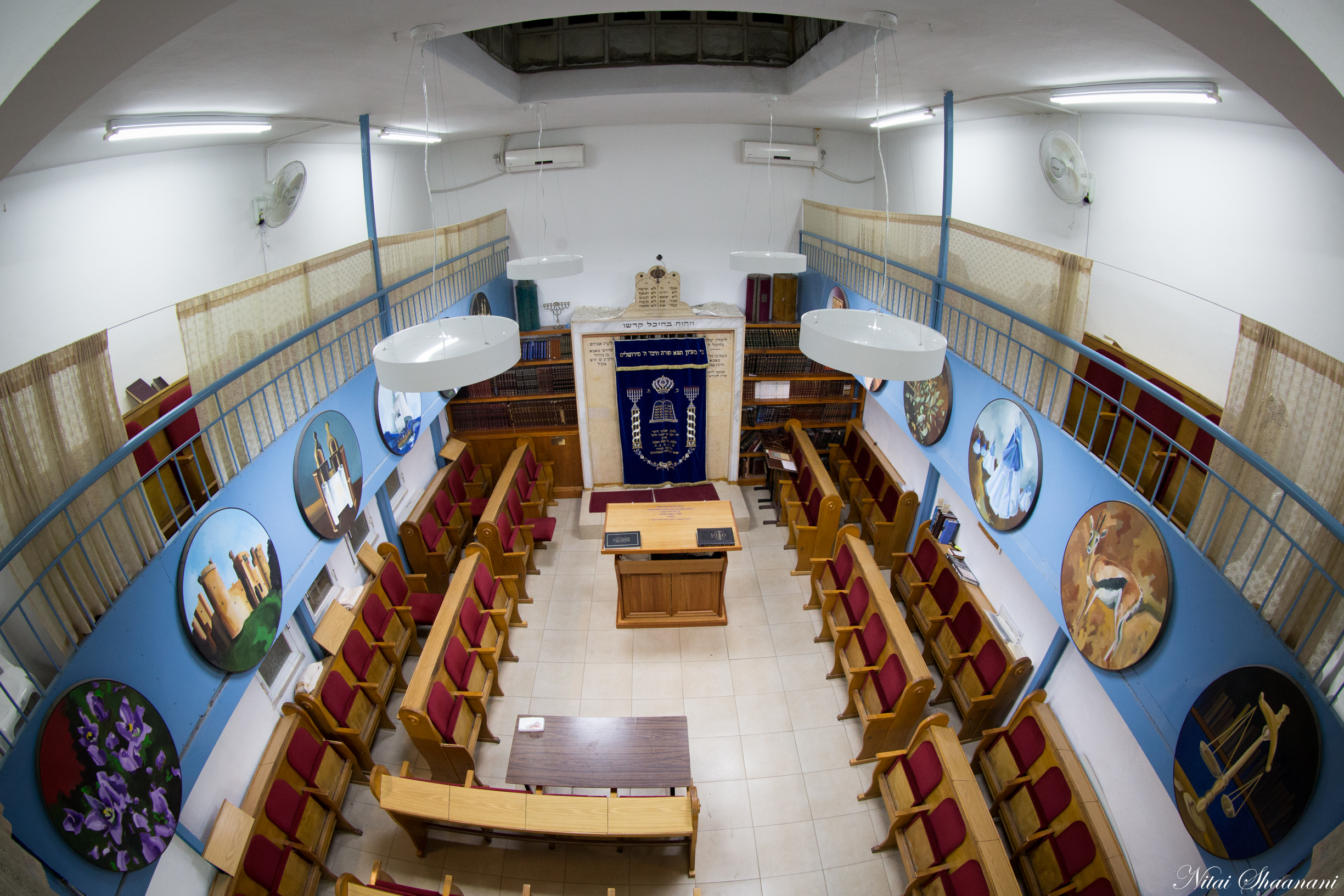 Jerusalem